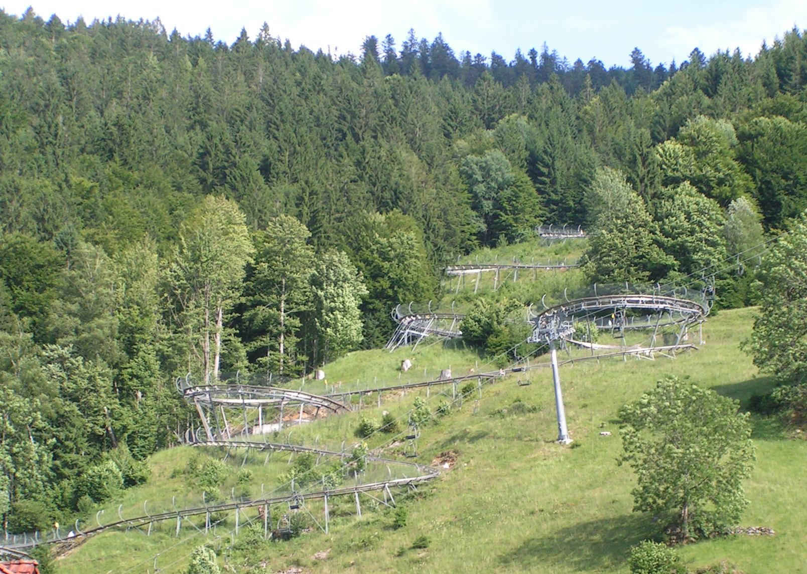 Allwetter-Rodelbahn bei Todtnau